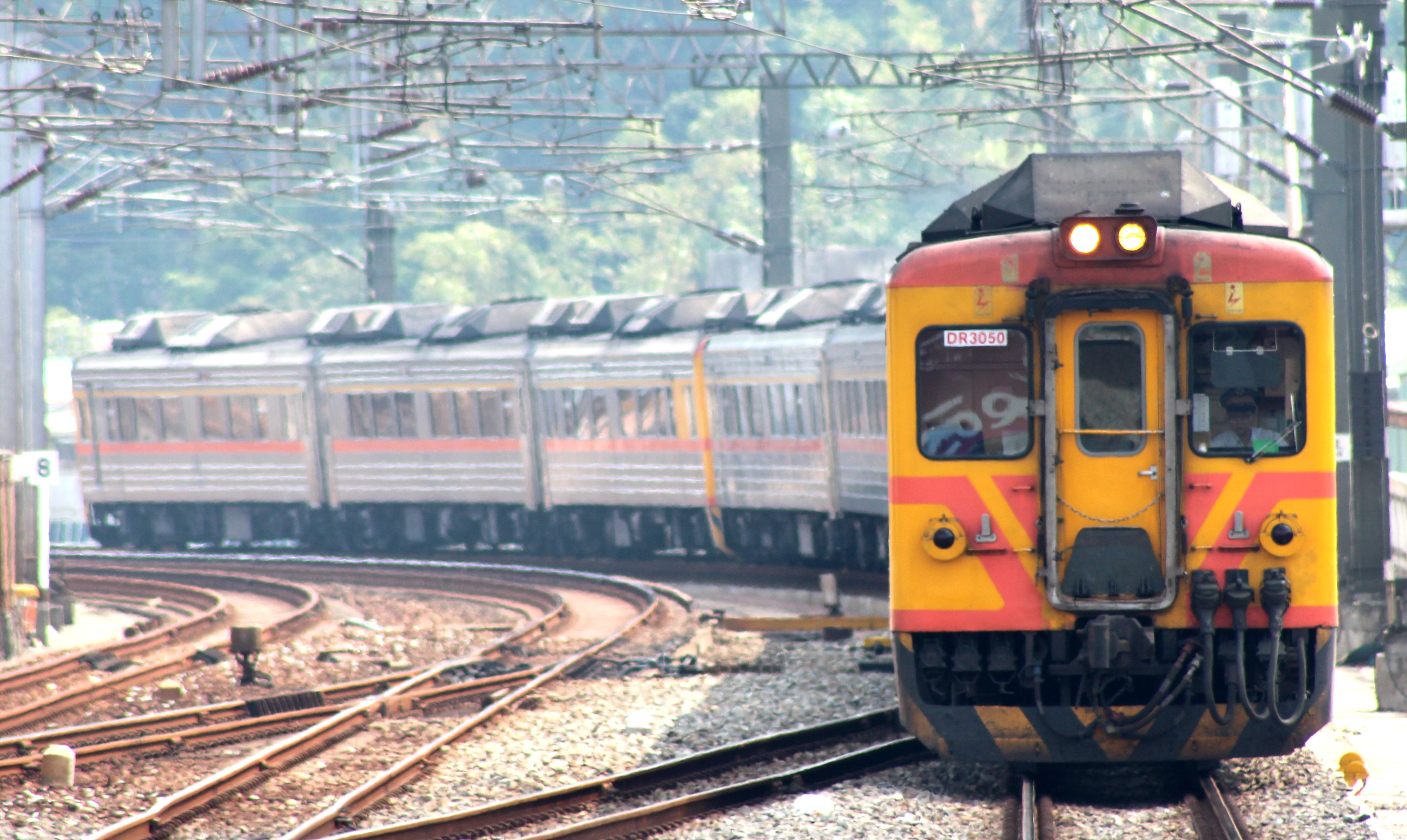 台湾鉄路管理局DR3000型気動車（汐止駅にて）